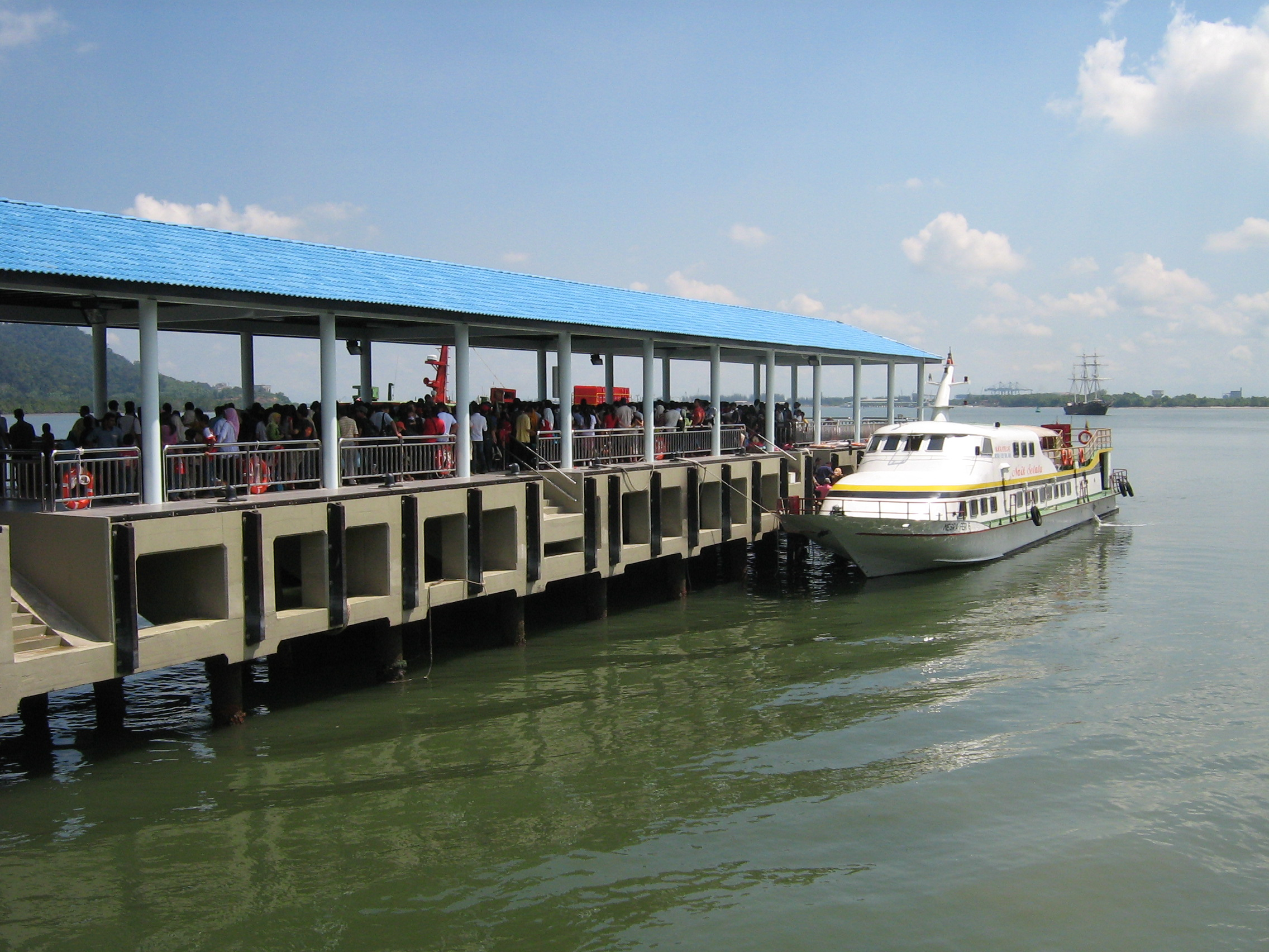 jetty ferry at lumut, malaysia